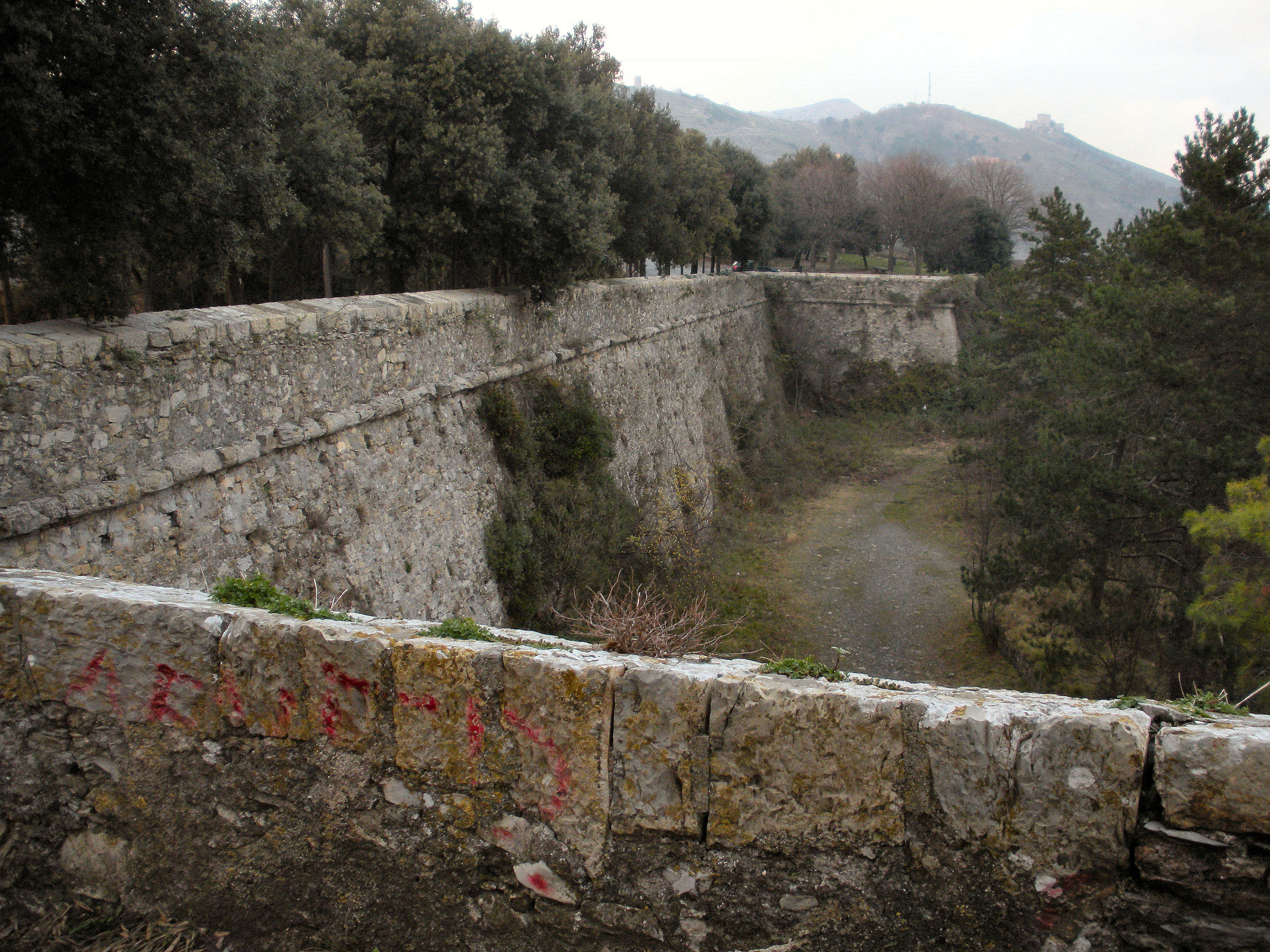 Genova, Mura del Castellaccio